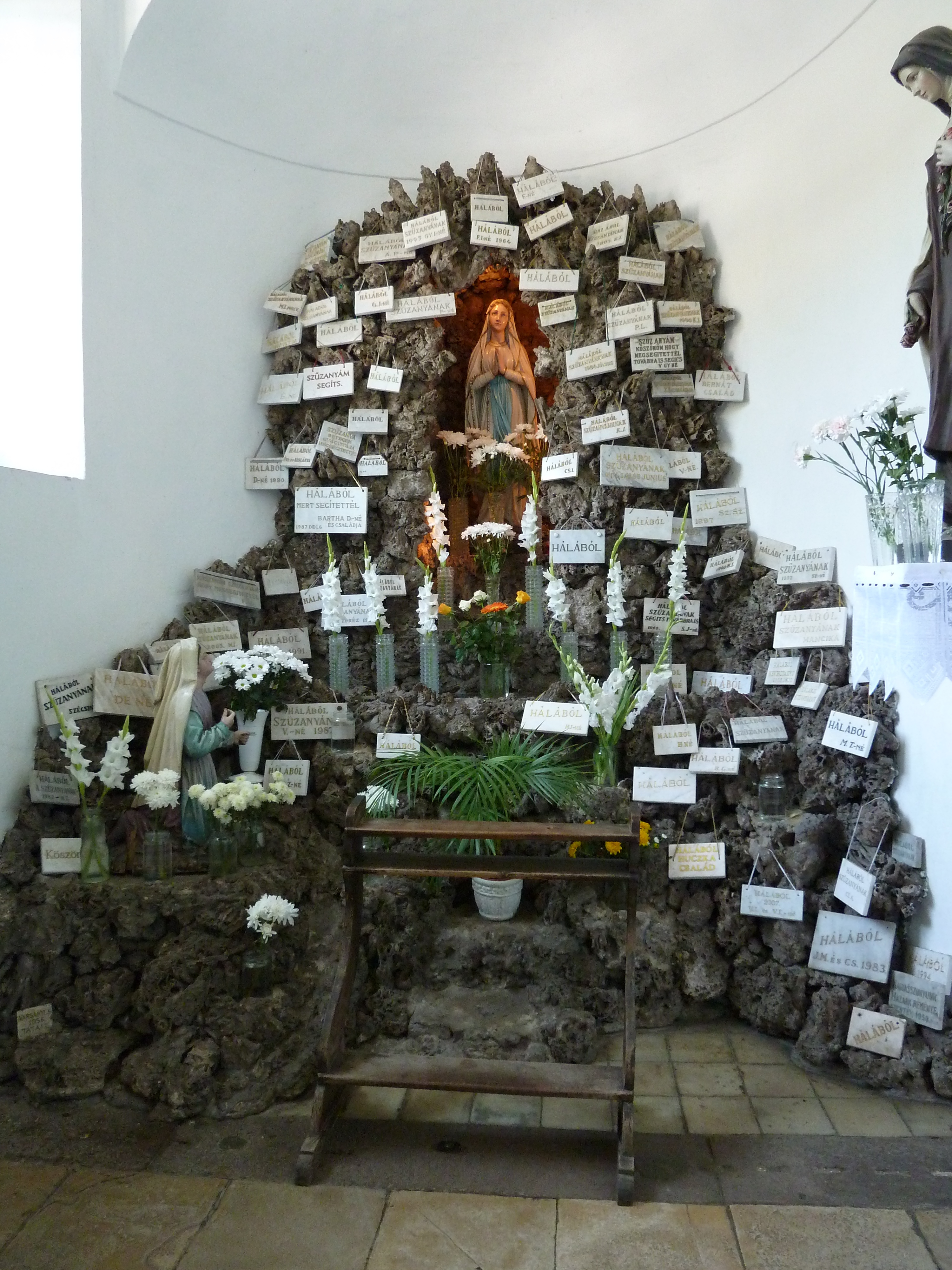 A Szent Adalbert plébániatemplom oldalkápolnája, Hatvan